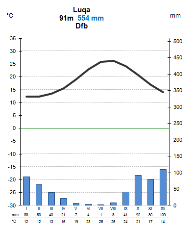 Luqa kliimadiagramm